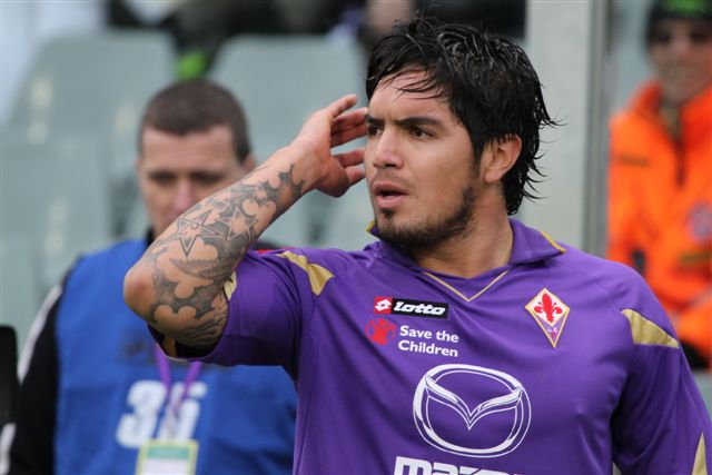 Juan Manuel Vargas Risco (Lima, 5 ottobre 1983) è un calciatore peruviano, centrocampista della Fiorentina e della Nazionale peruviana.